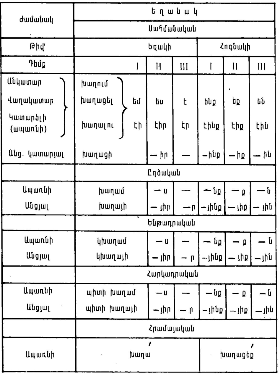 Խոնարհման հարացույց